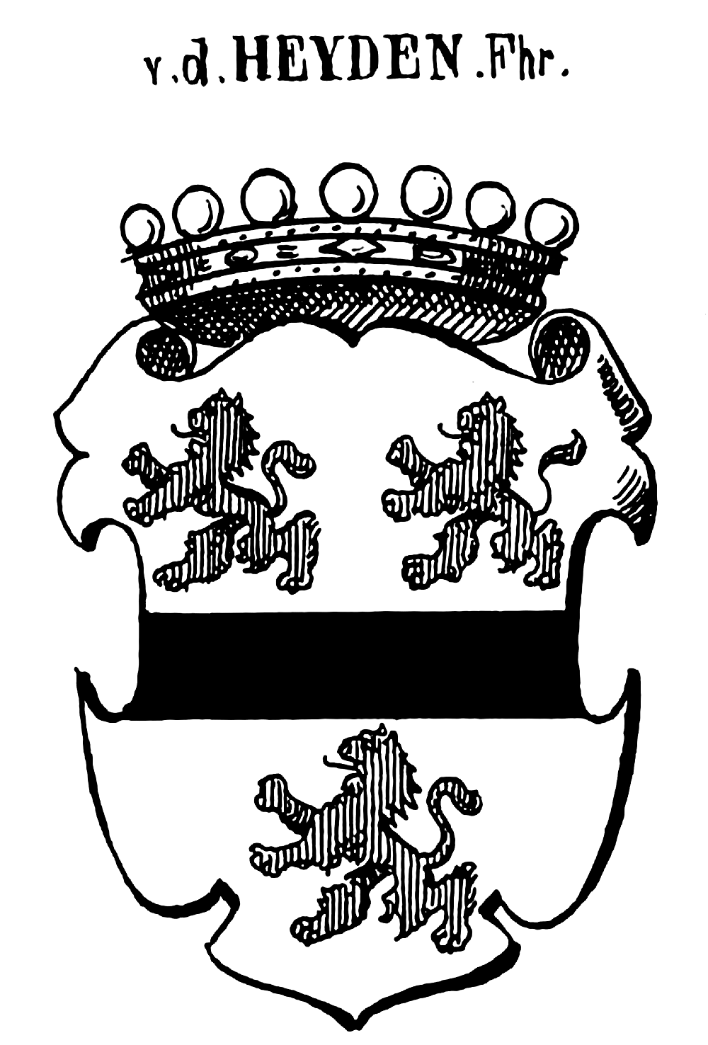 Wappen der Freiherrn von der Heyden (Luxemburg)